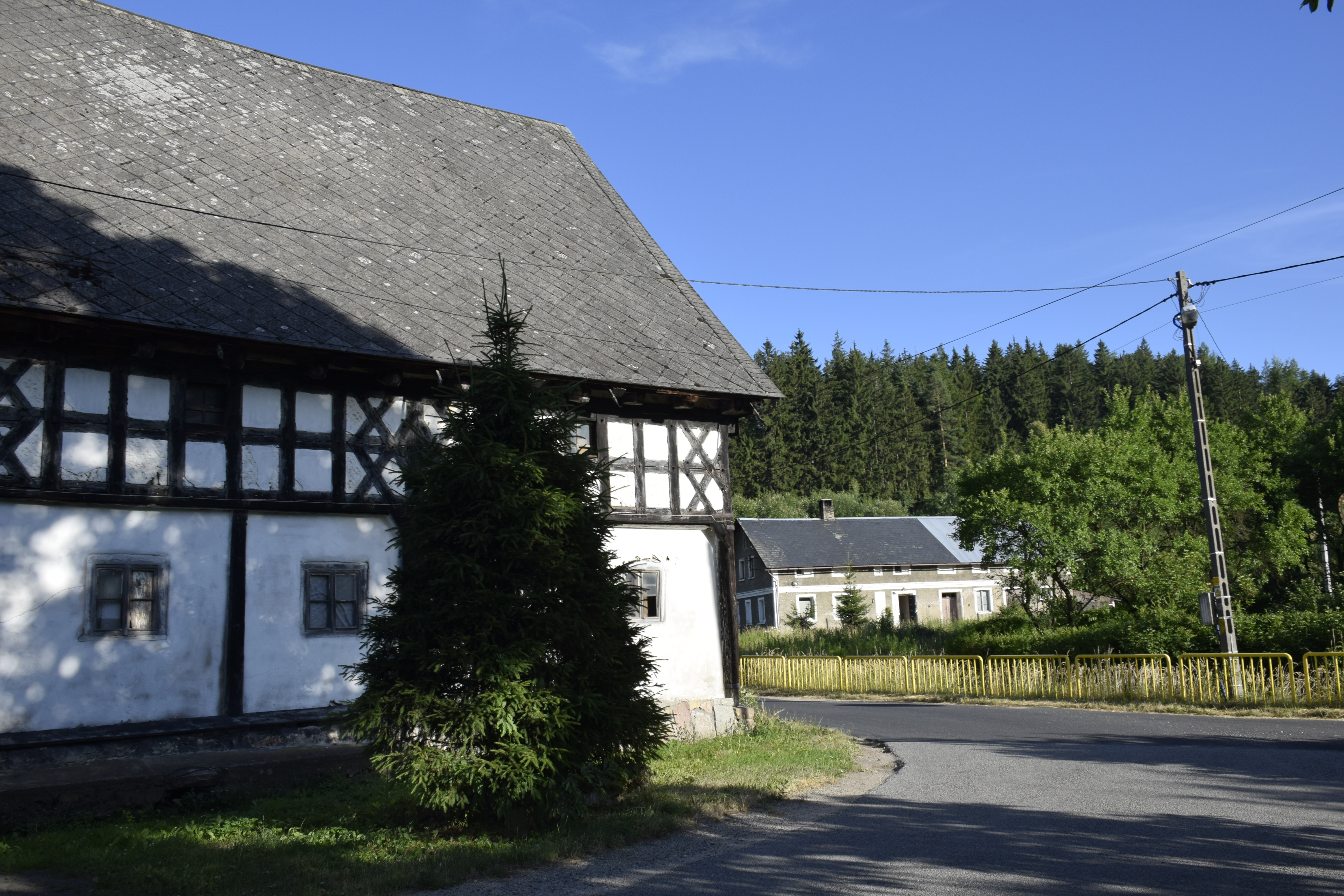 Gruszków (województwo dolnośląskie). Polska